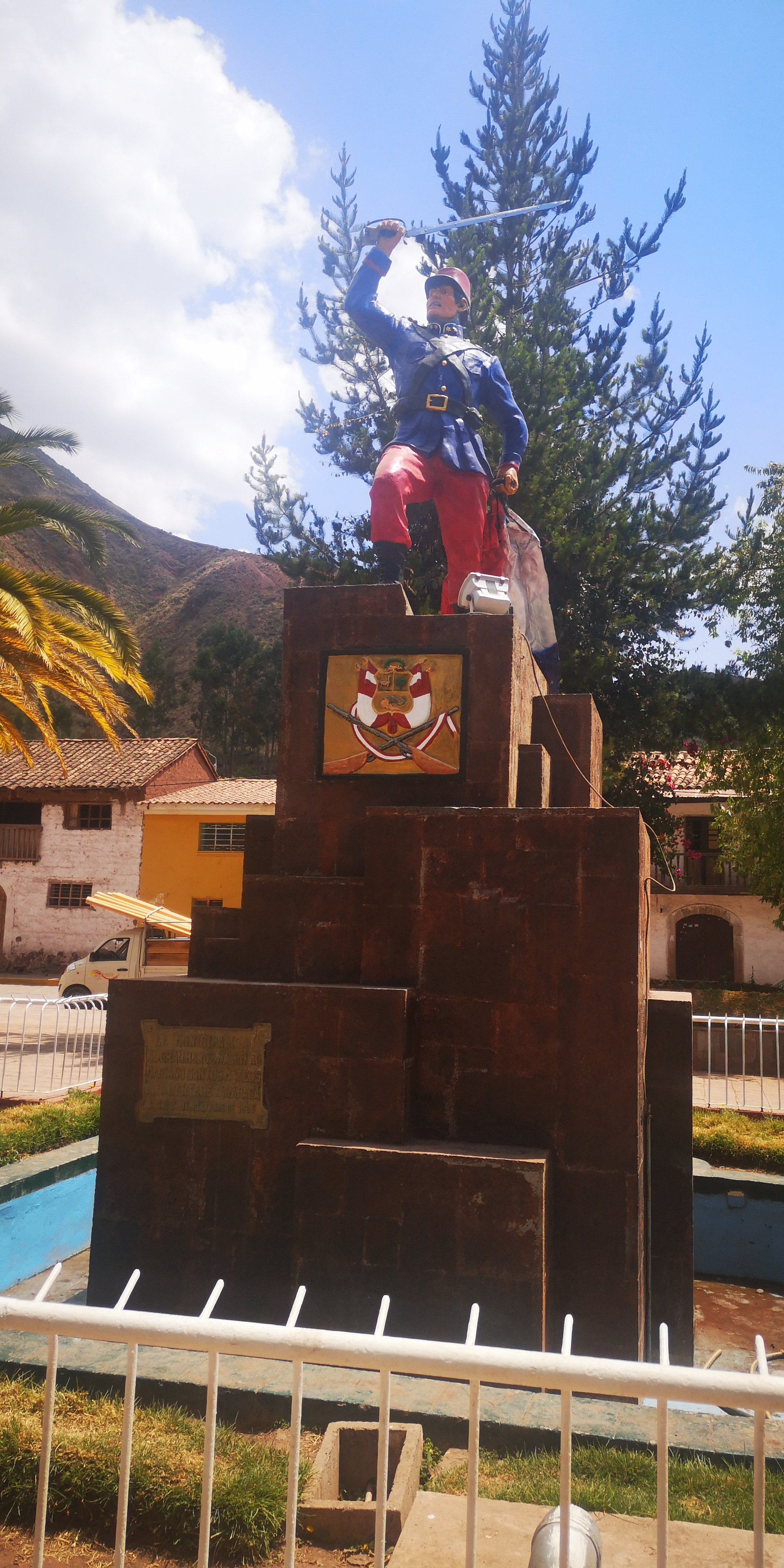 Monumento al héroe peruano Mariano Santos en la plaza de armas del pueblo de Lucre, provincia de Quispicanchi, departamento del Cusco, Perú.